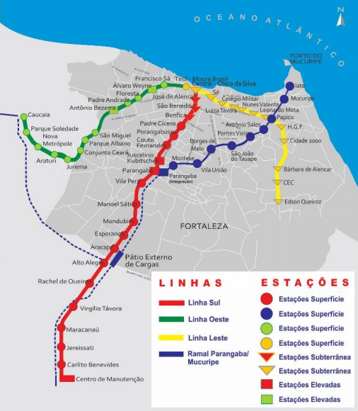 Mapa atualizado do Metrô de Fortaleza.